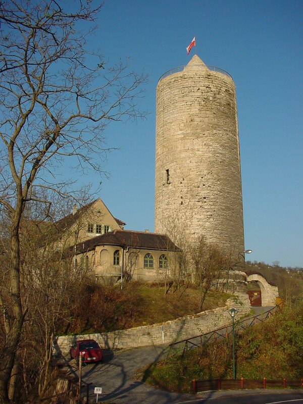 Bergfried der Burg Camburg